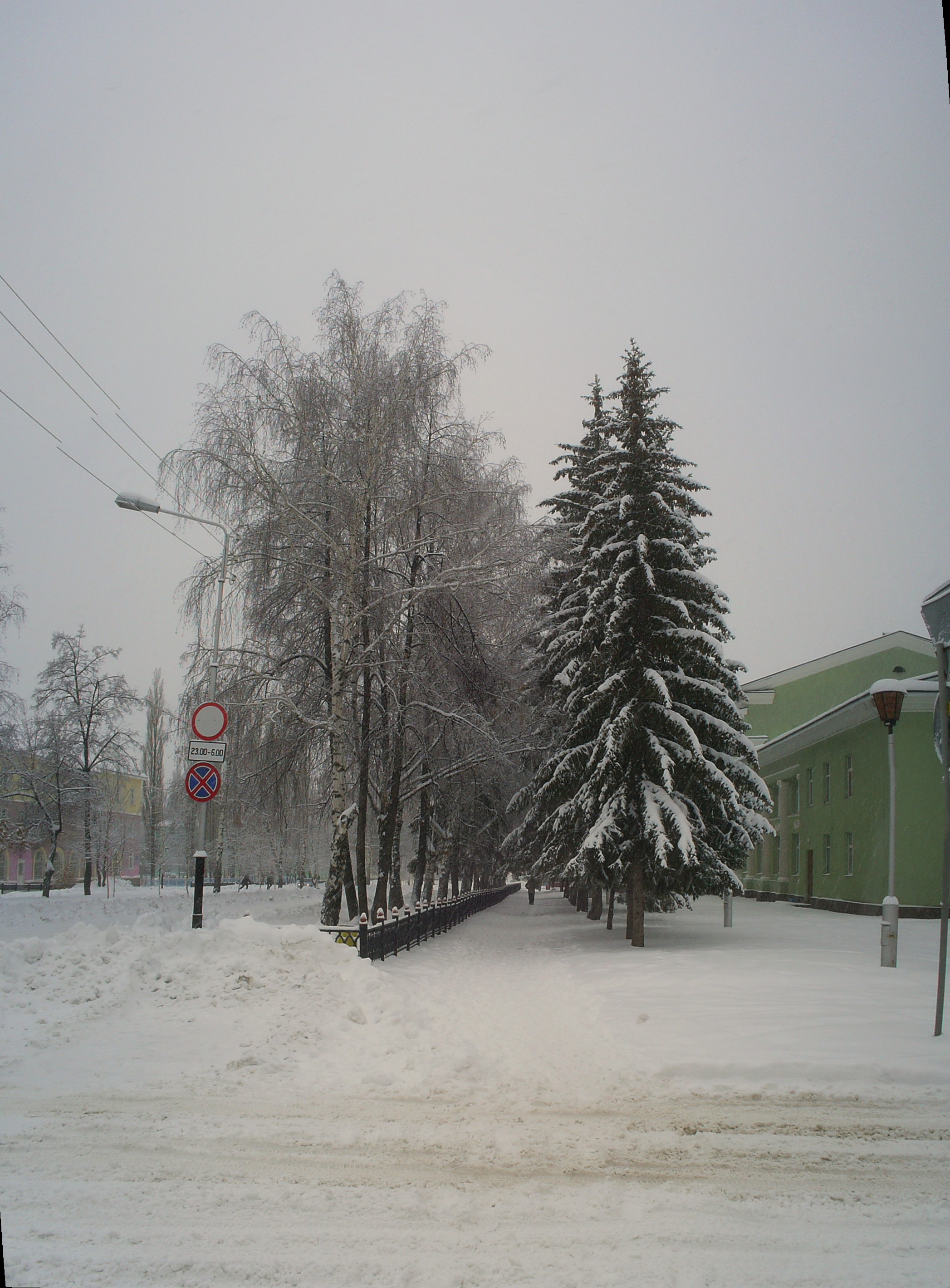 Проспект Ленина 26.12.2010